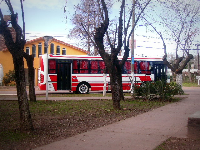 Linea 276 "La Isleña"Presta Servicios en Zelaya desde 1974